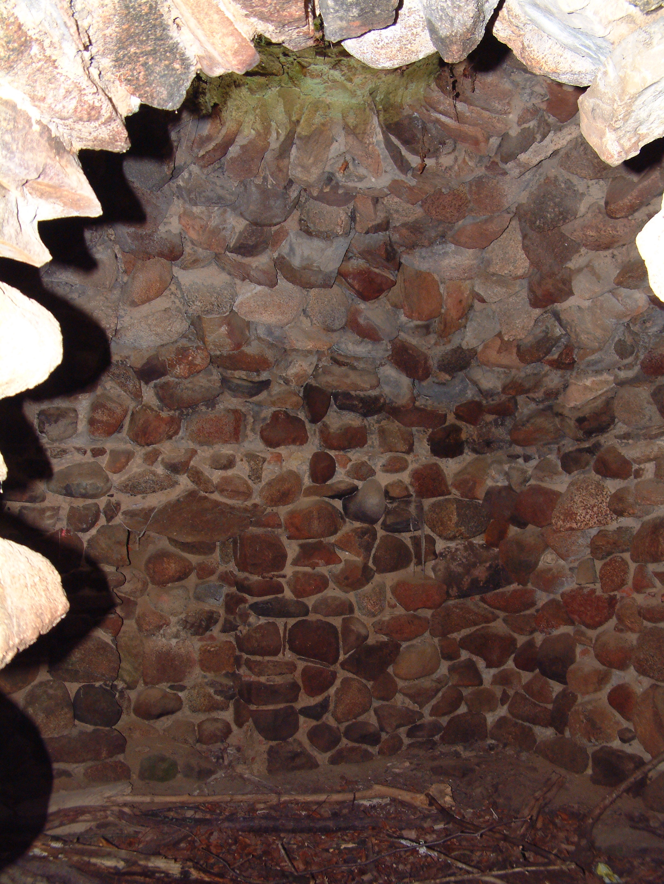 Hauptkammer Hügelgrab Gresse